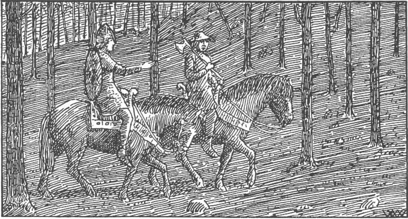 Wilhelm Wetlesen: Illustration for Harald Hardrådes saga, Heimskringla 1899-edition. nn: «Då dei rei gjennom nokre øydeskogar kvad Harald.»